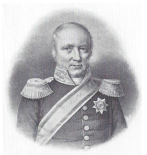 Bildnis von Carl von Wegnern (1777-1854)